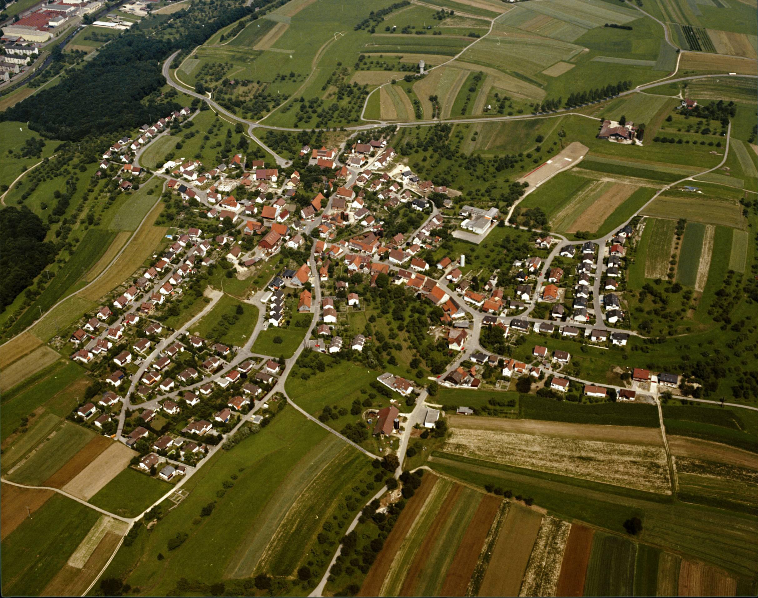 Luftbild von Weiler - Staatsarchiv Sigmaringen - Archivalieneinheit N 1/96 T 1 Nr. 898